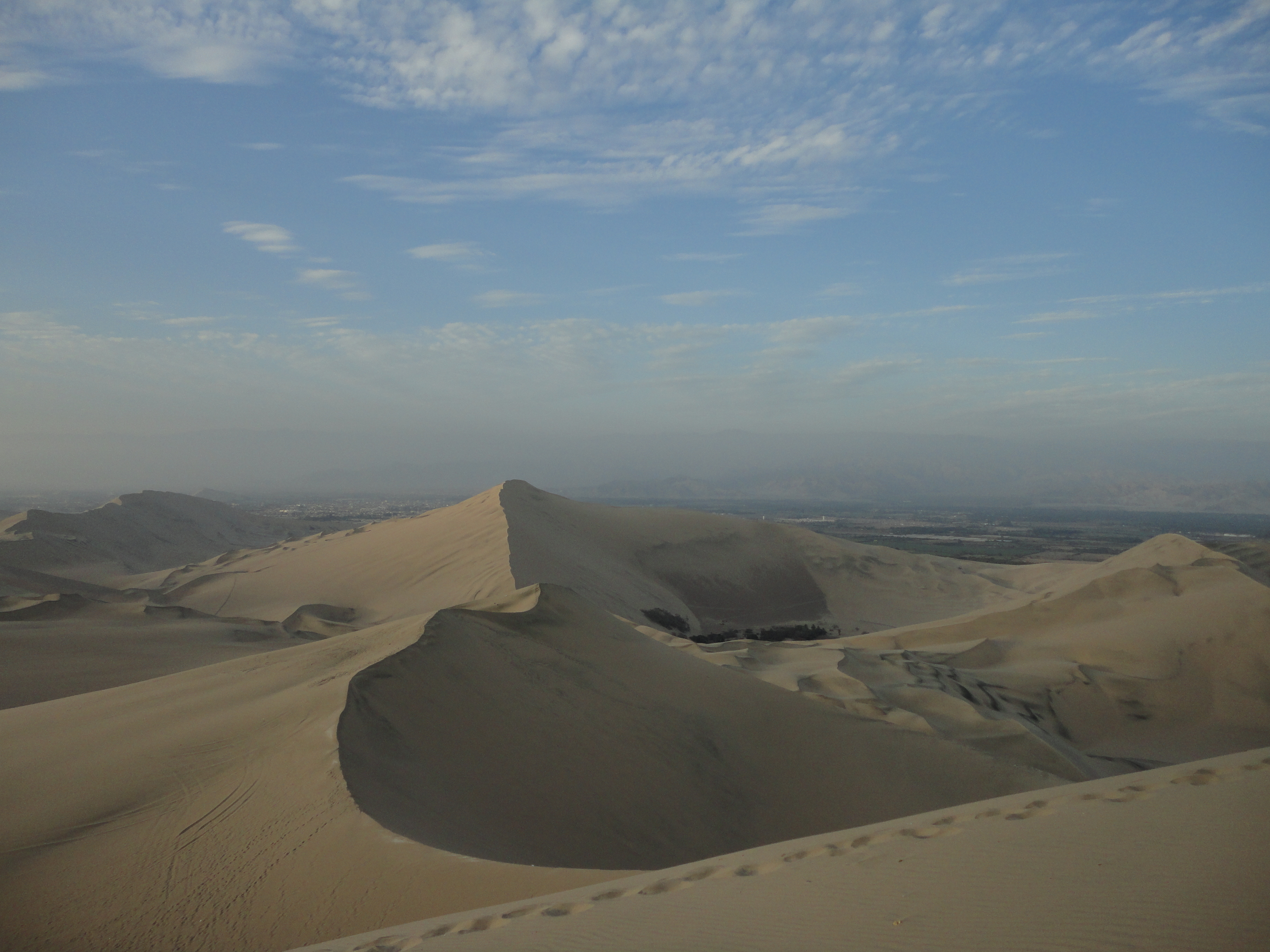 Le dune di sabbia nel deserto Peruviano, Regione di Ica, Huacachina